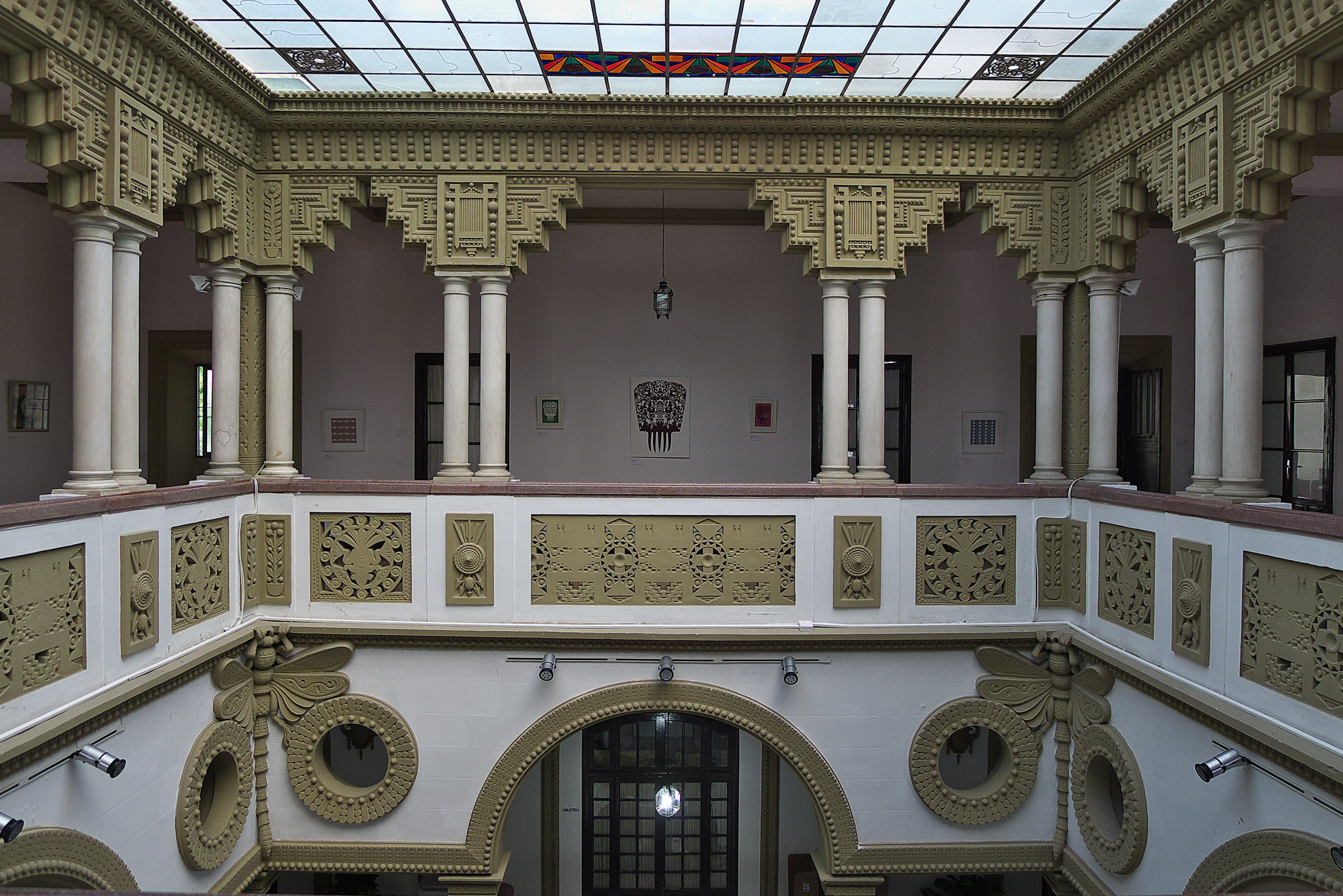 Exposición Iberoamericana de Sevilla. Galería alta del patio. Rómulo Rozo desarrolla el programa escultórico del pabellón (1929)